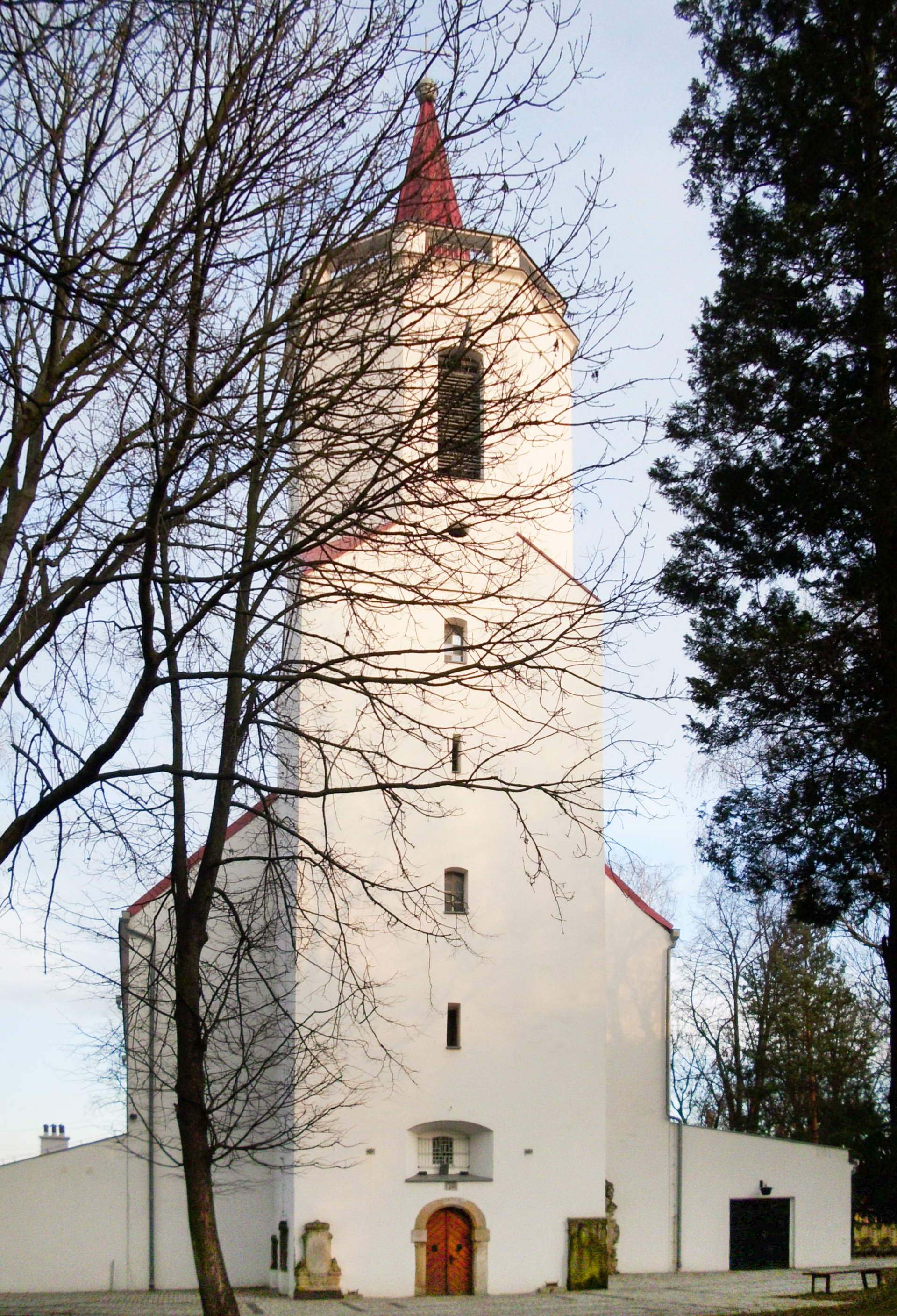 Bogatynia, ul. Białogórska 2 - dawny kościół ewangelicki, ob. rzymskokatolicki kościół parafialny p.w. śś. Piotra i Pawła, 1690, XIX, 1966